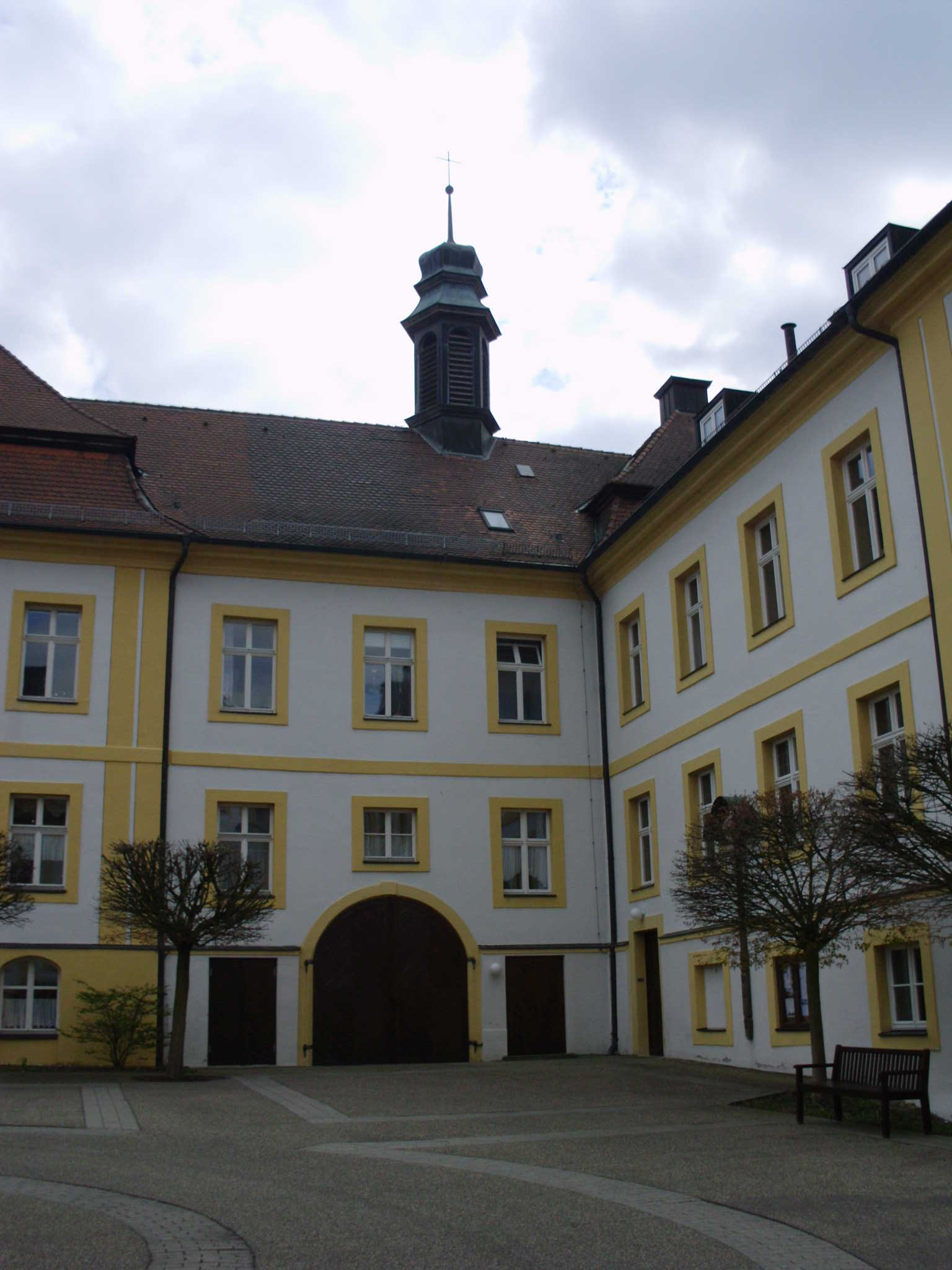 Absberg, Landkreis Weißenburg-Gunzenhausen (Bayern), Ehemaliges Deutschordensschloss, Schlosshof mit dem Dachreiter der Schlosskapelle, heute Kath. Pfarrkirche St. Ottilia